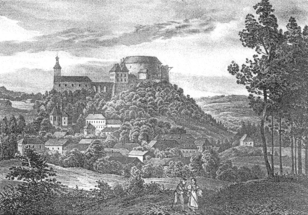 Bouzov počátkem 19. století před přestavbou